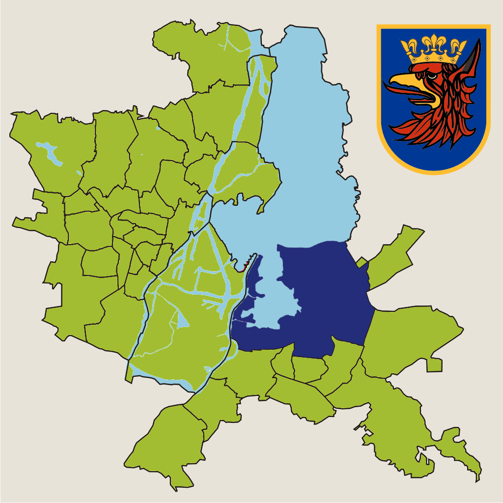 Osiedle "Dąbie" w Szczecinie - jednostka pomocnicza miasta w 2010